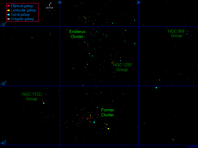 Mappa degli ammassi di Eridano e Fornace